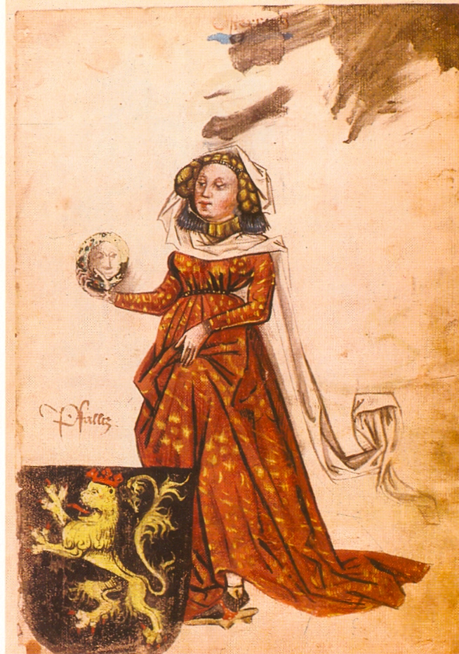 Ingeram-Codex der ehemaligen Bibliothek Cotta Pfalltz Mechthild von der Pfalz (1419-1482), 1452 Gemahlin Herzog Albrechts VI.